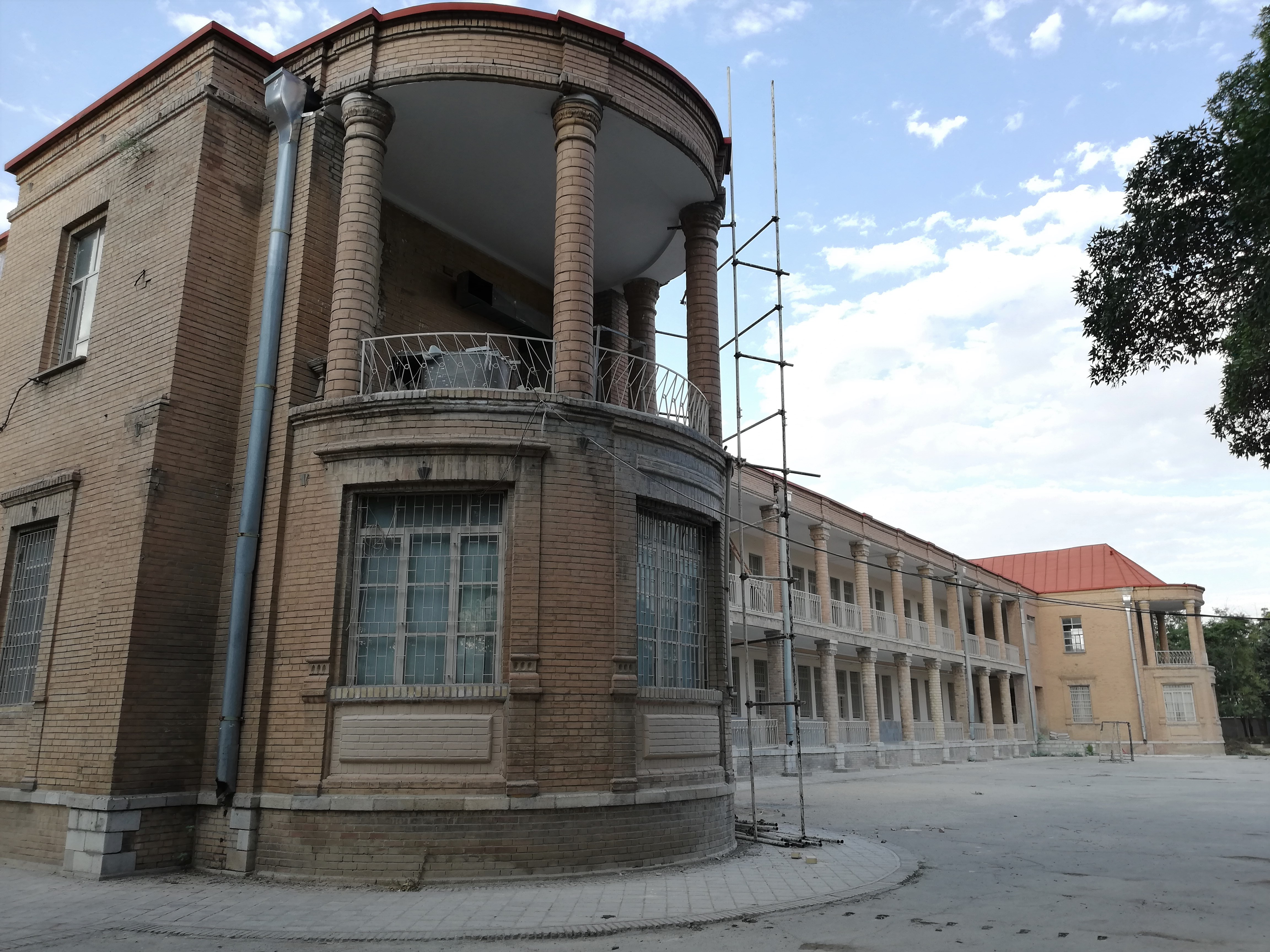 جزئیات معماری دبیرستان پهلوی بروجرد